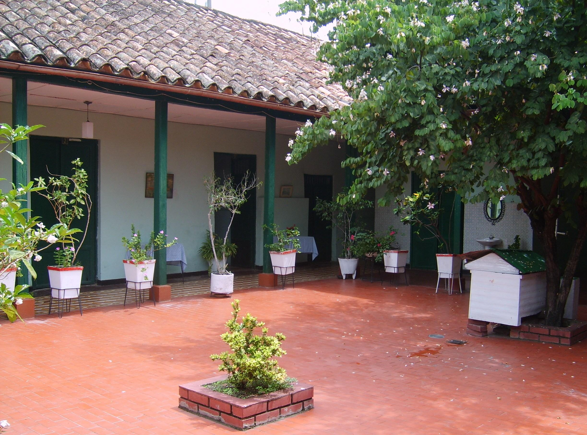 Hotel Guacaná, Tocaima, Cundinamarca, Colombia